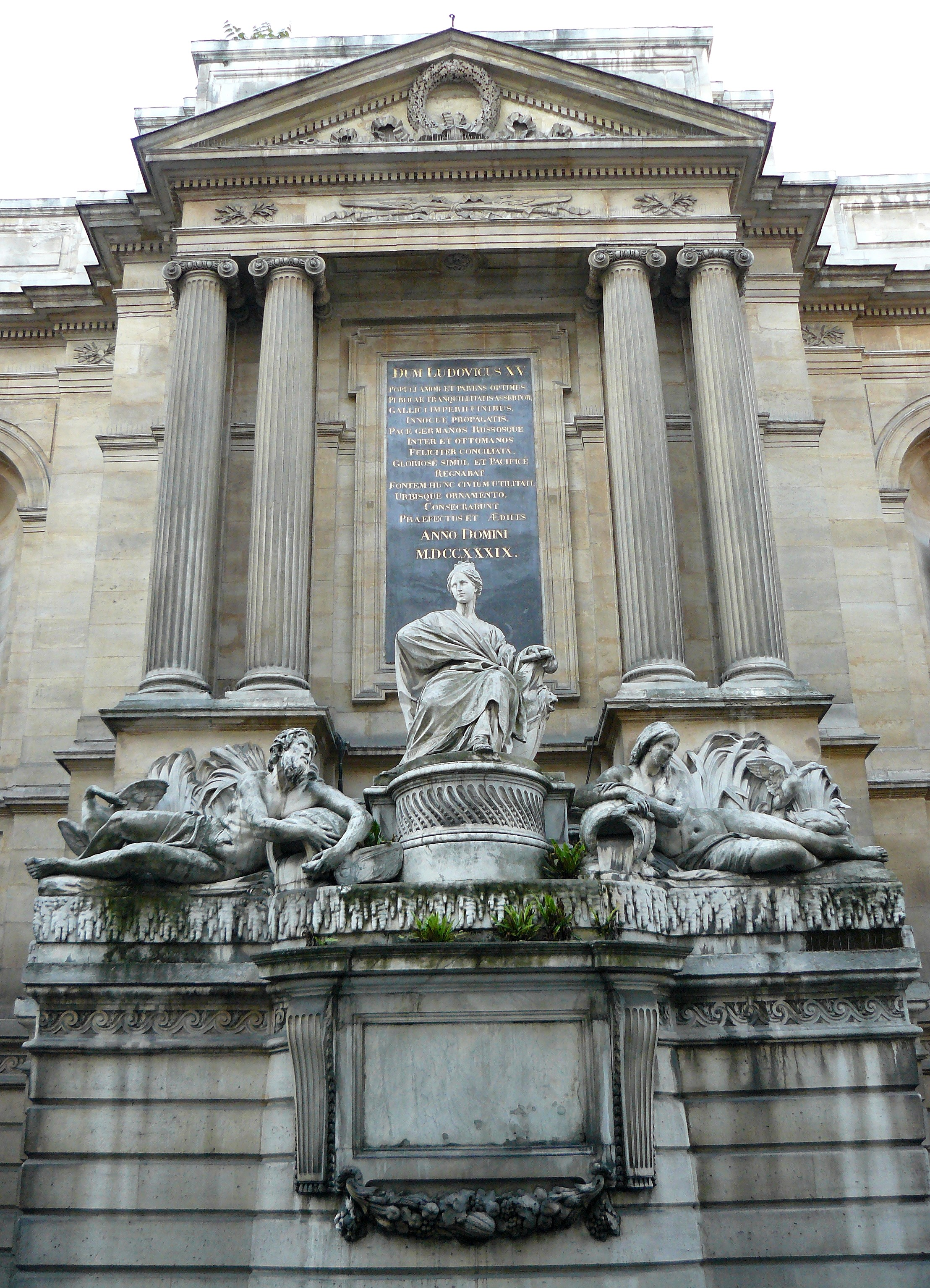 Fontaine des Quatre-Saison - Edmé Bouchardon - 1745 - Paris 7ème - Zone centrale